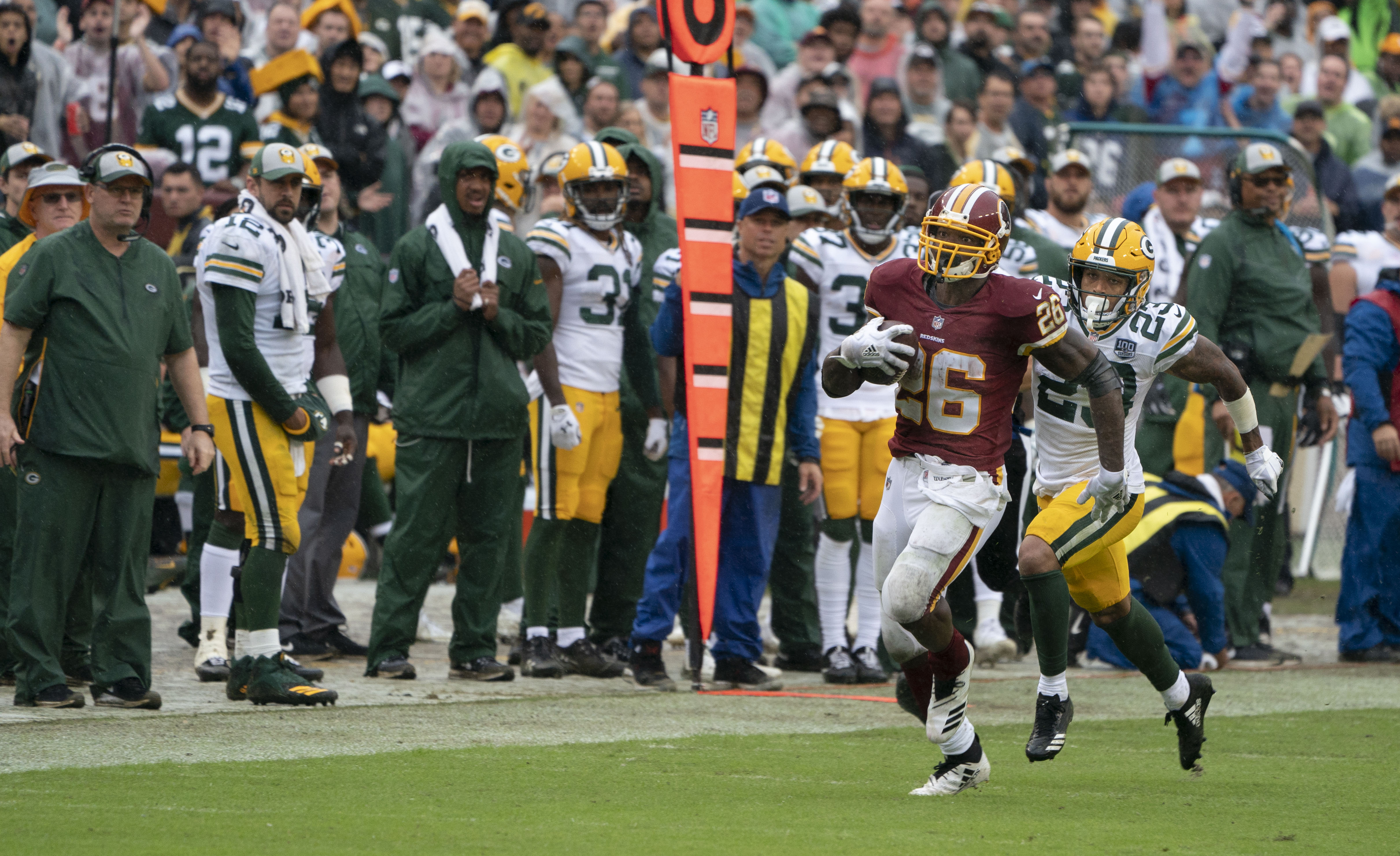 Packers at Redskins 09/23/18